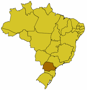 Karte Brasiliens, Paraná hervorgehoben, GFDL nach der Vorlage Bild:Brasilien Bundesstaaten.png